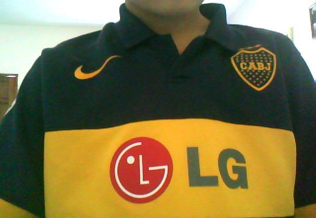 camiseta de boca de la temporada 2009-2010